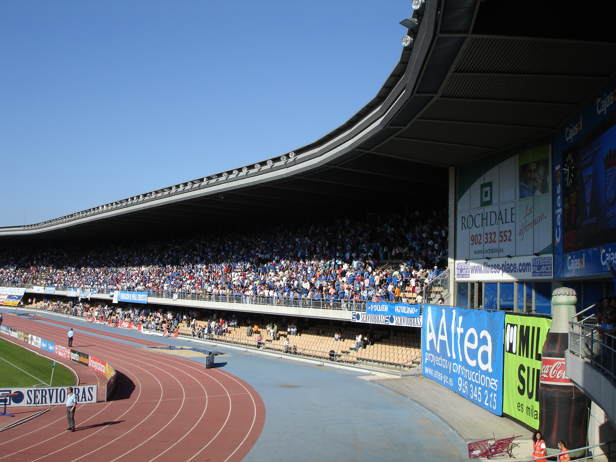 Xerez C.D. playing in Chapín. Jerez de la Frontera (Andalusia, Spain)